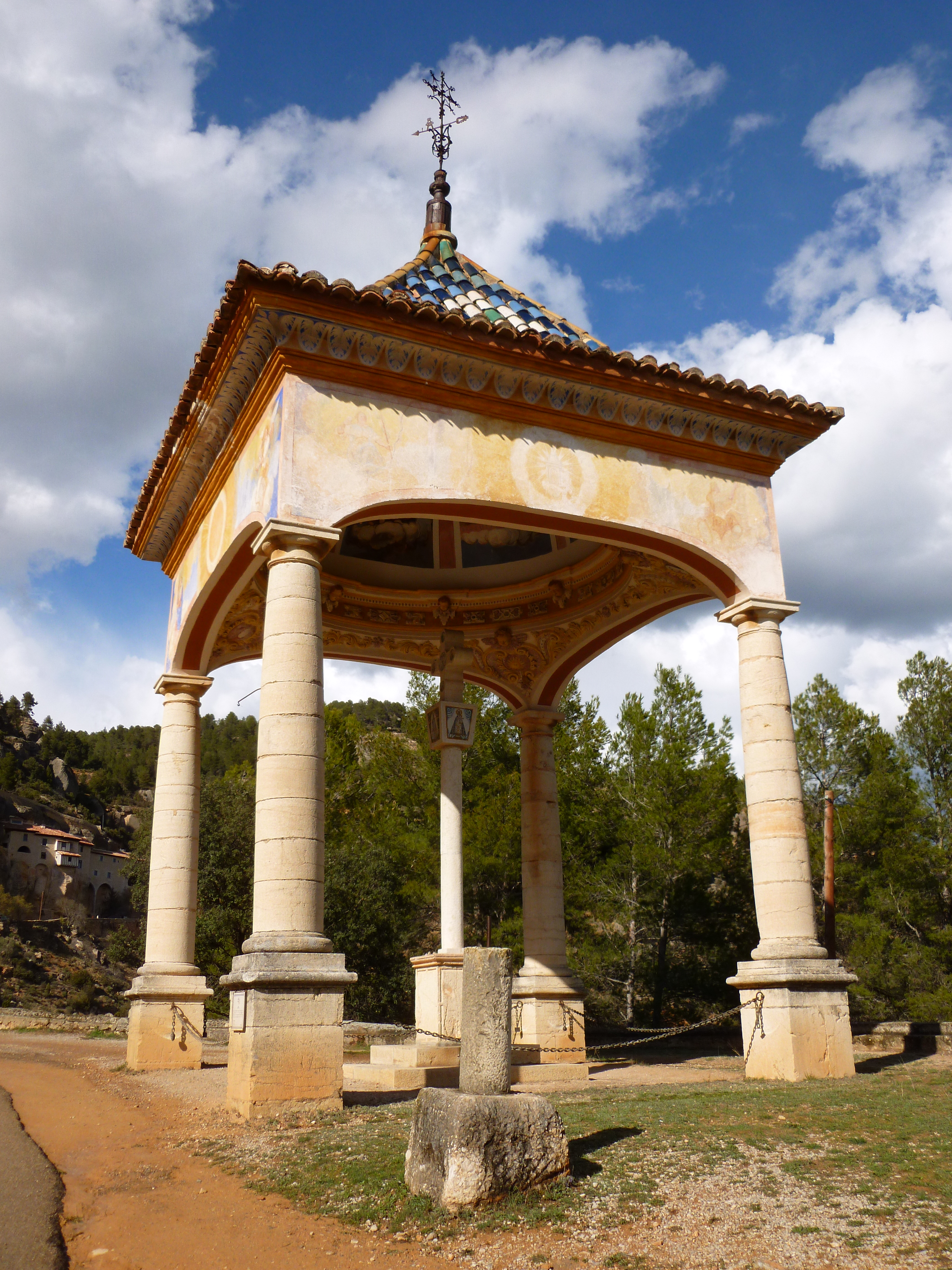 Santuari de la Mare de Déu de la Balma